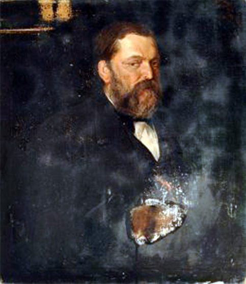 Gaetano D'Agostino, autoritratto (olio su tela, cm 70x79, originale firmato in alto a destra)